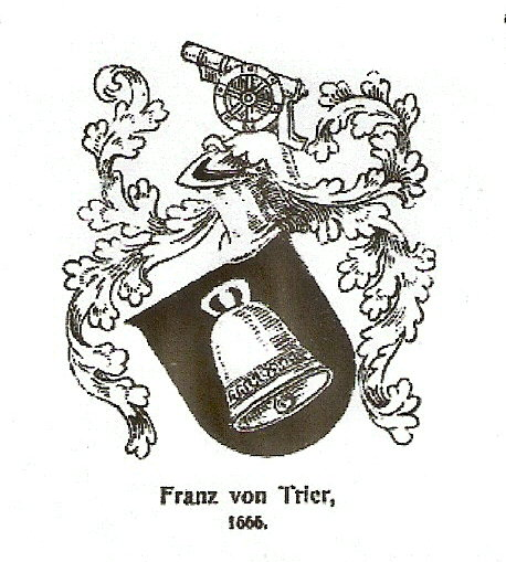 eigener Scan eines Wappens aus benannter Quelle